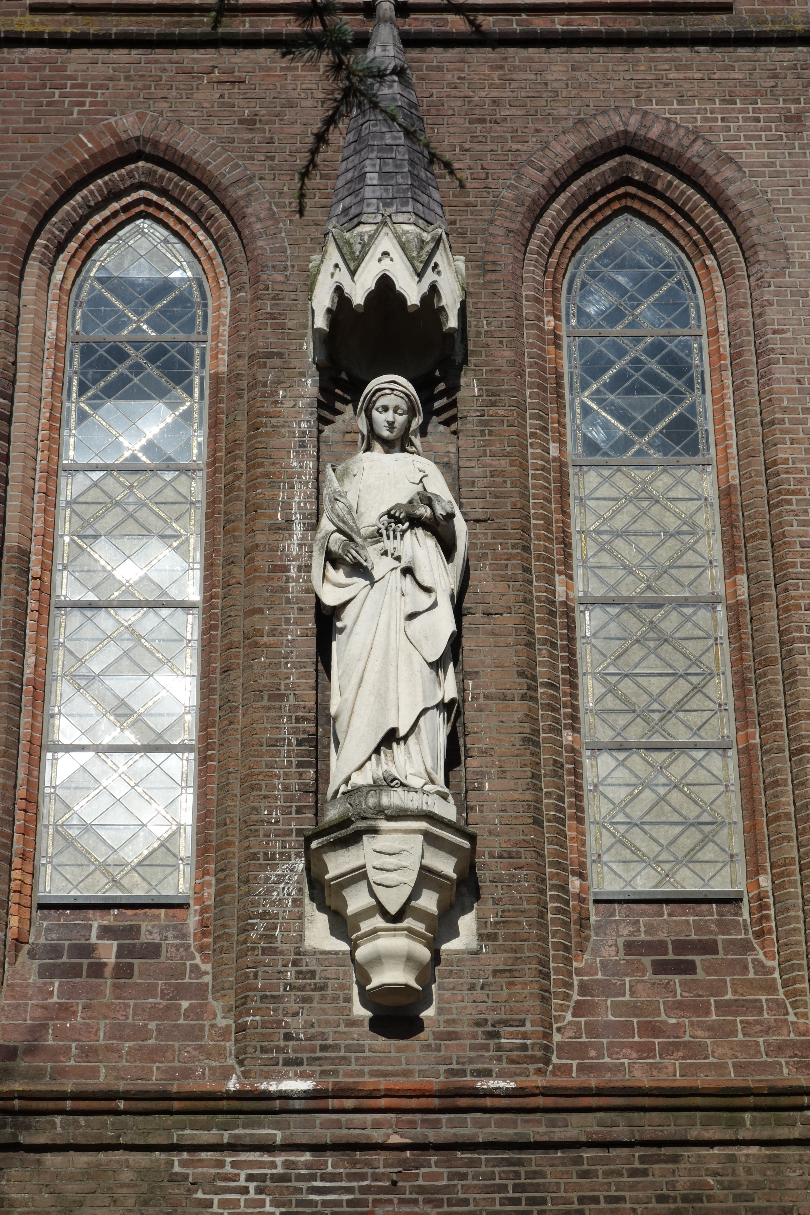 St. Cunera op de naar haar vernoemde kerk in Nibbixwoud.